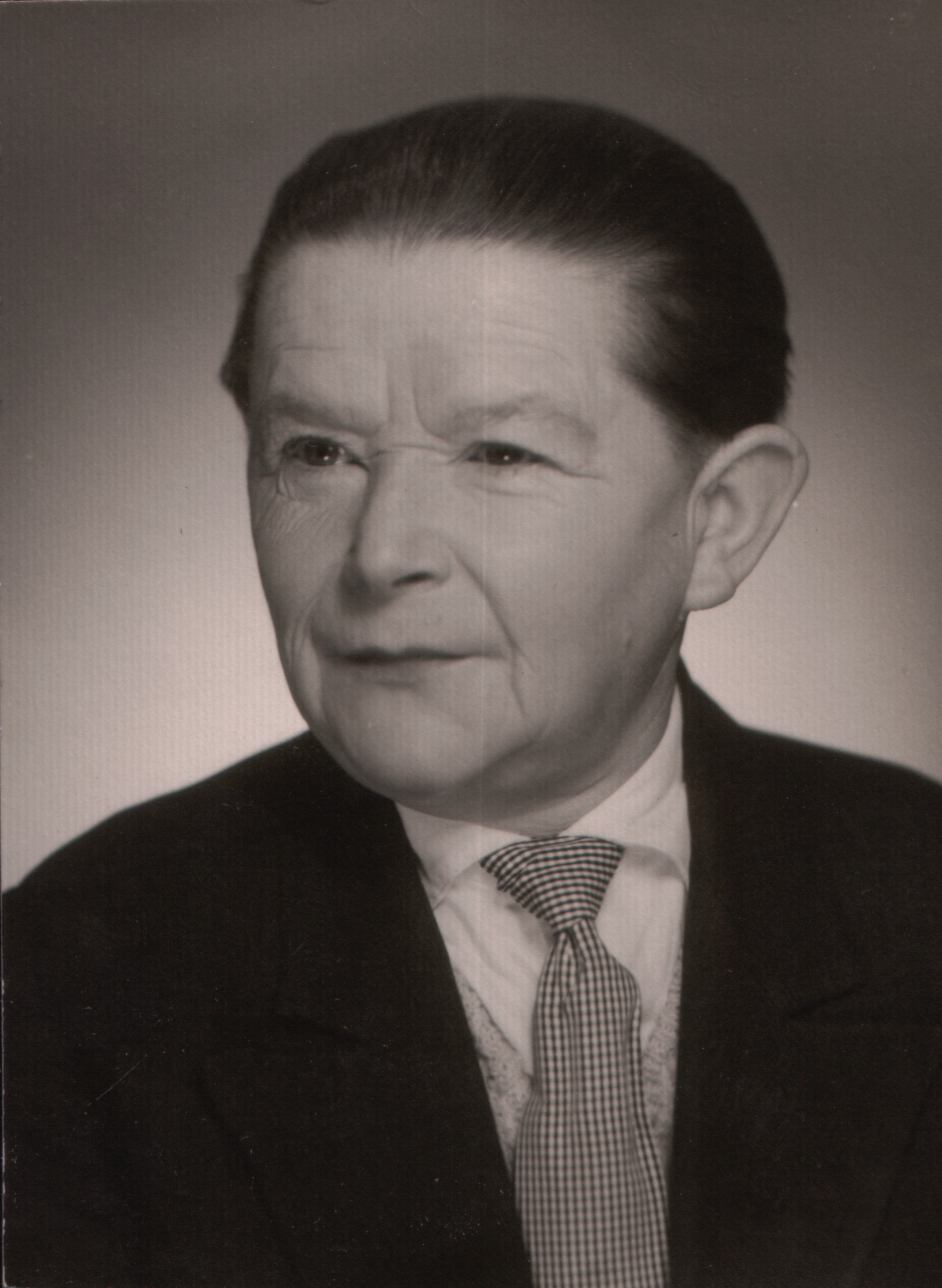 Bolesław Kamiński polski aktor, piosenkarz, kabareciarz i parodysta